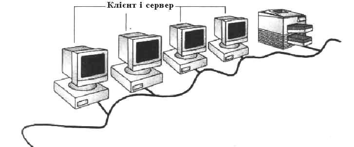 Однорангова мережа